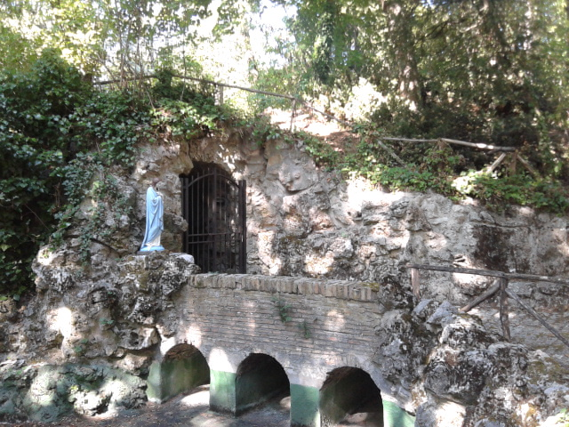 Ghiacciaia del principe